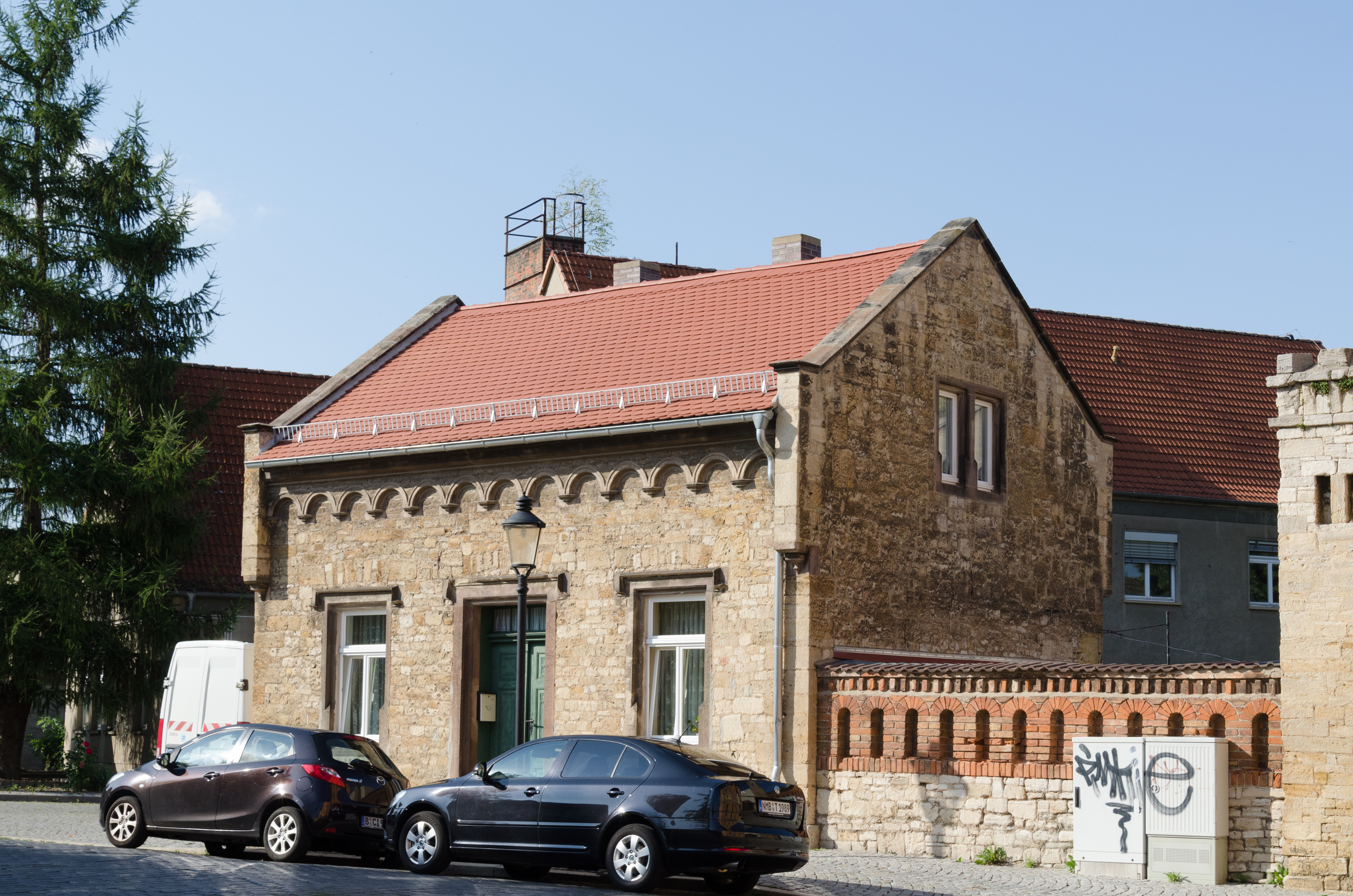 Naumburg, Georgenstraße 5